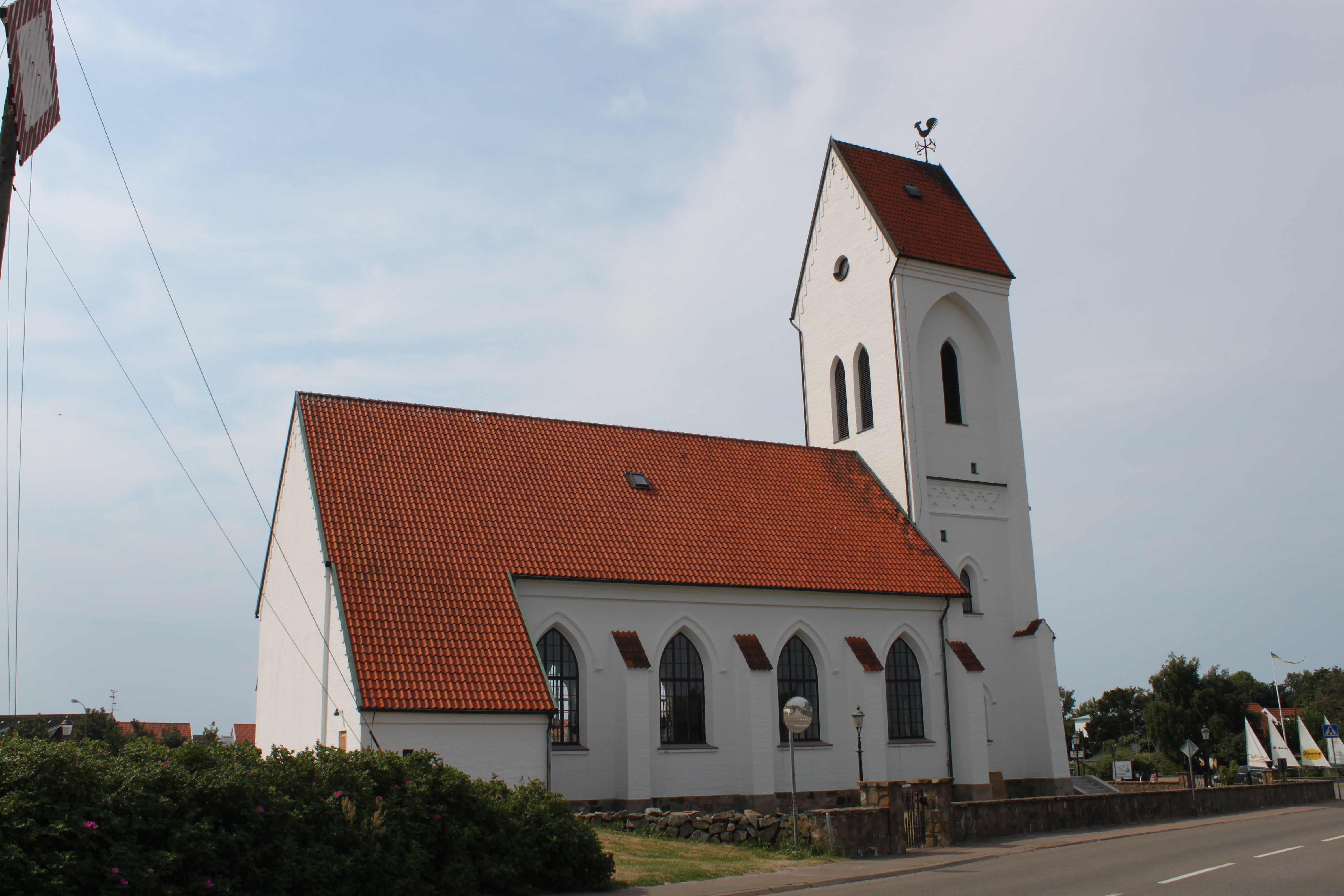 Torekovs kyrka